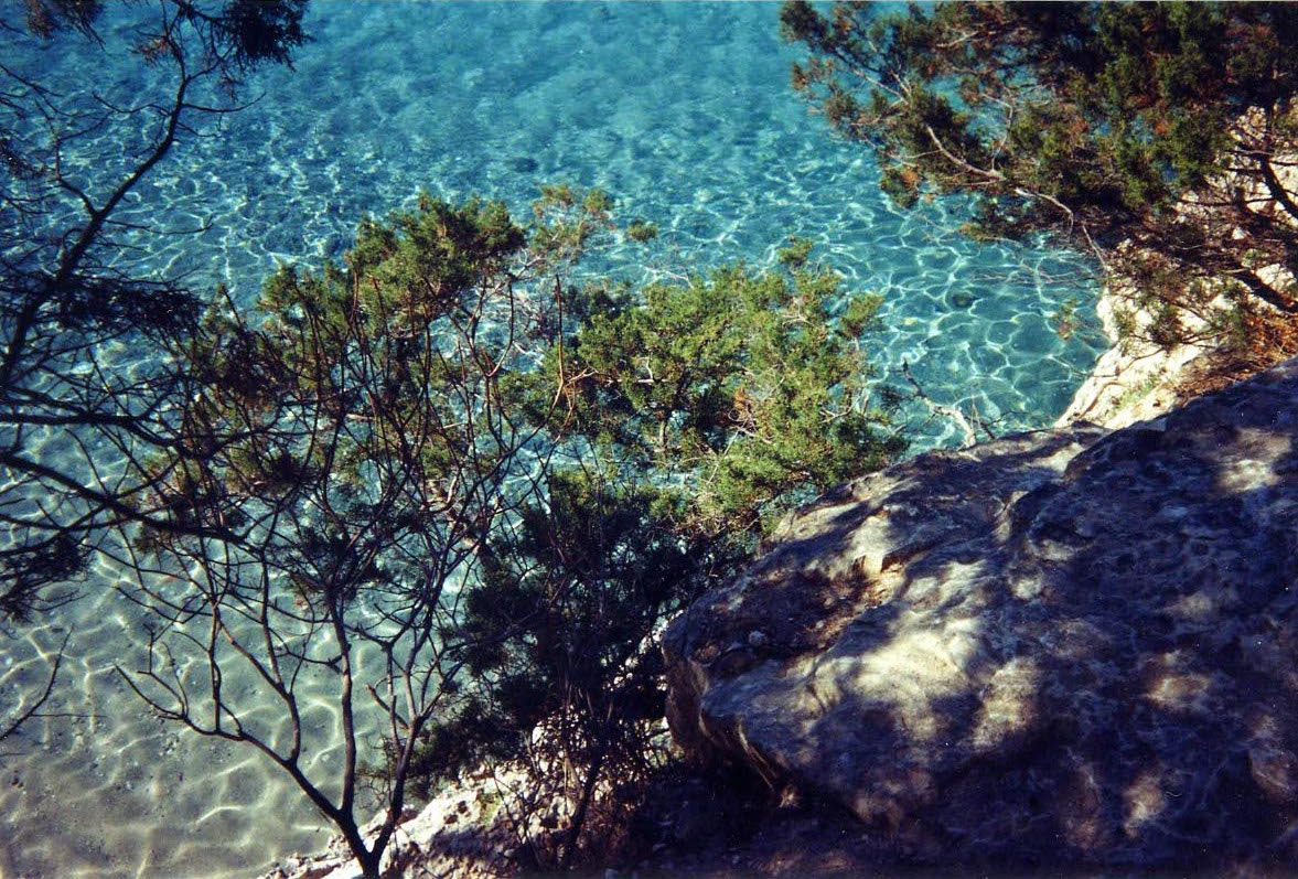 Foto di Marrabbio2